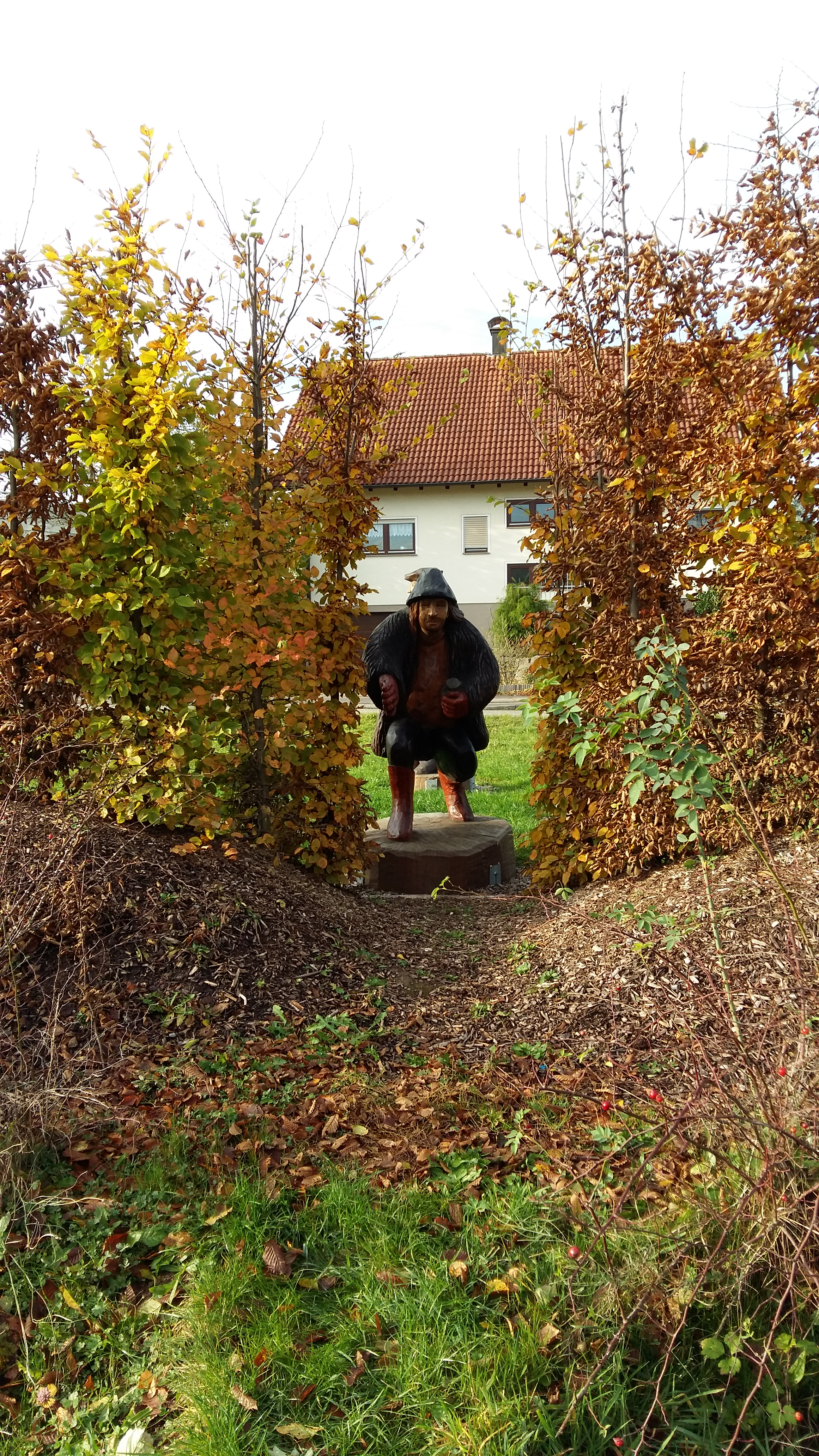 Brigand de Mainhardt Göckelbua passe une trouée dans la haie défensive de Hall